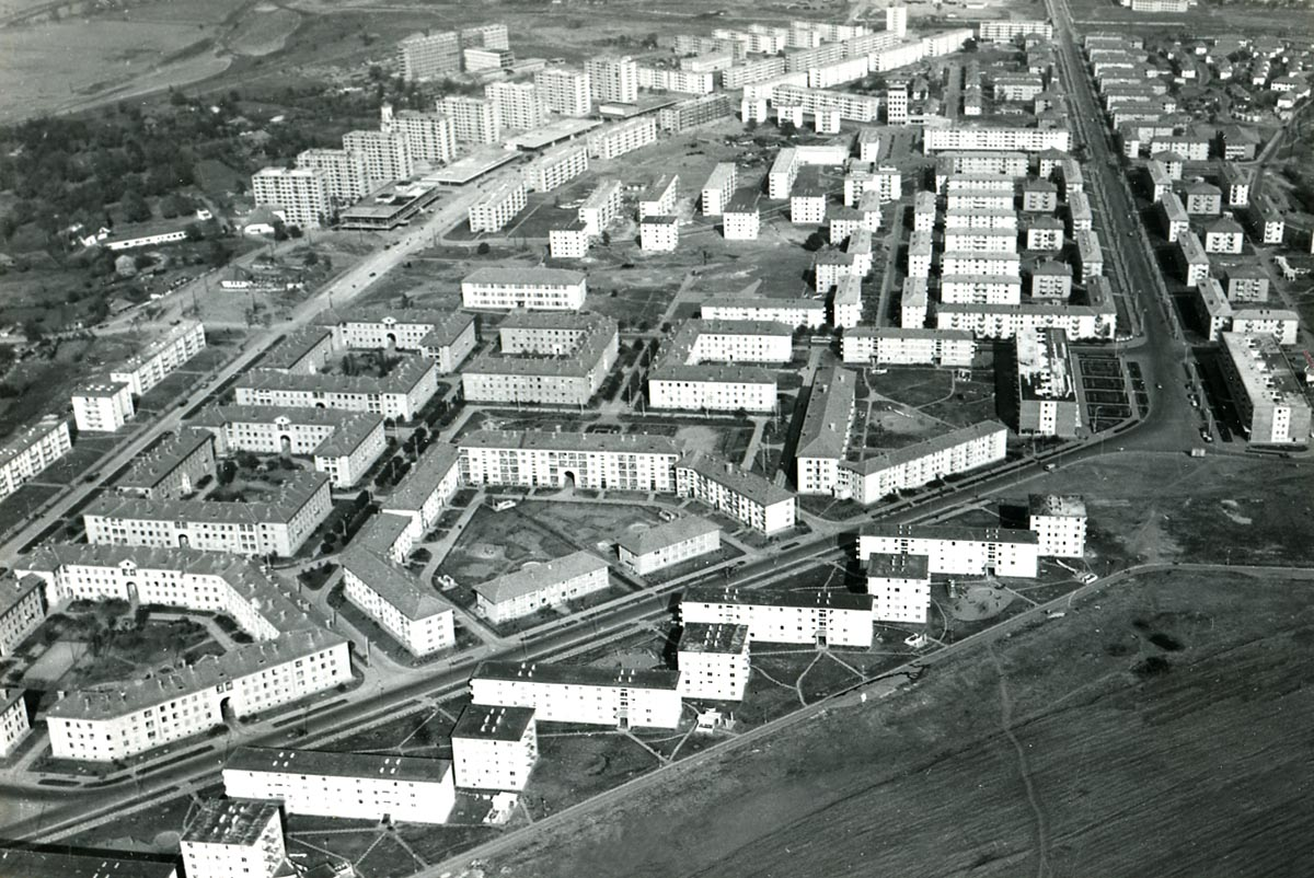 Vedere aeriană a orașului Gheorghe Gheorghiu-Dej/Onești. Cvartalurile I, II, III, IV, V